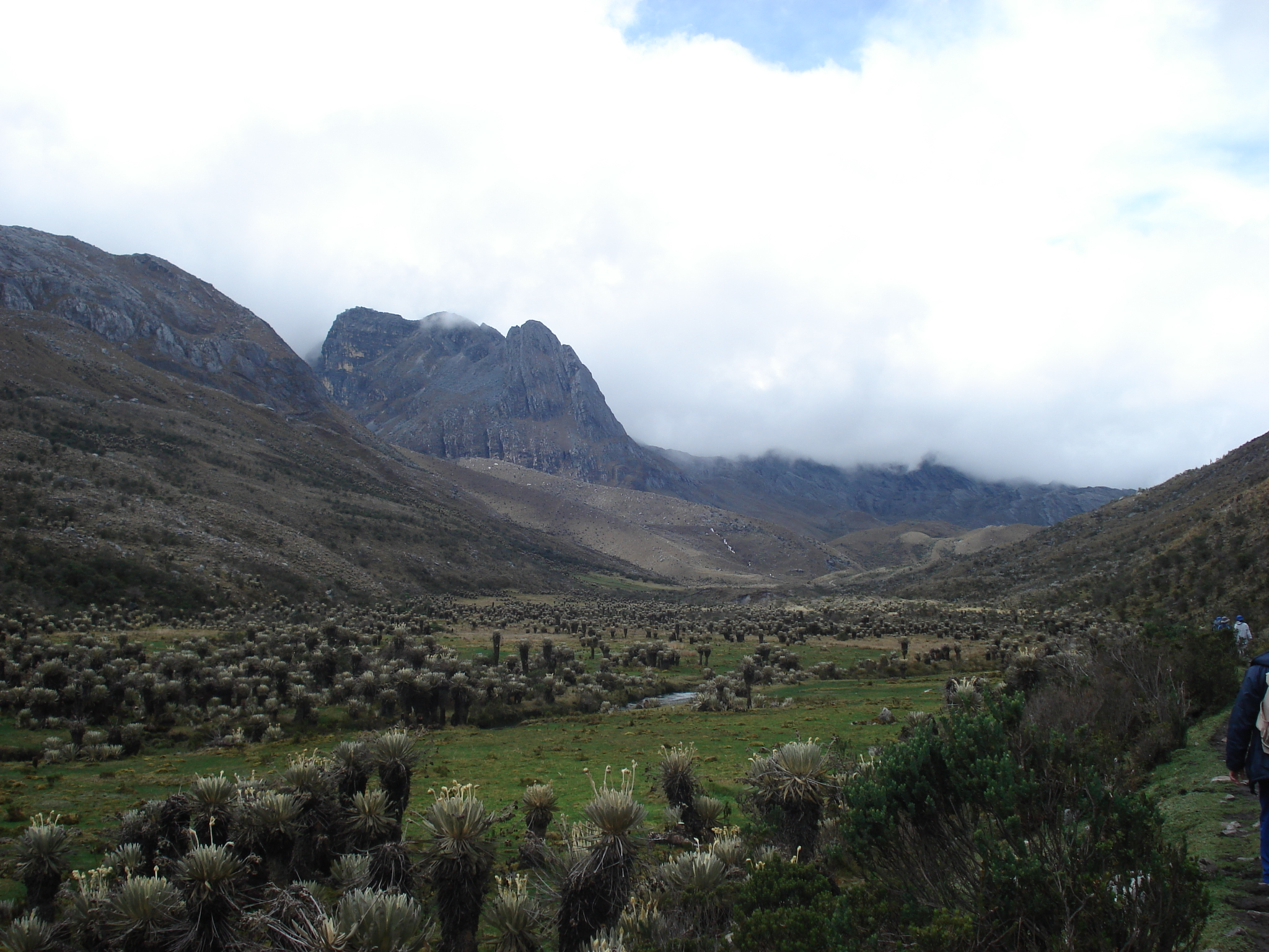 Valle de Frailejones en la Sierra Nevada del Cocuy